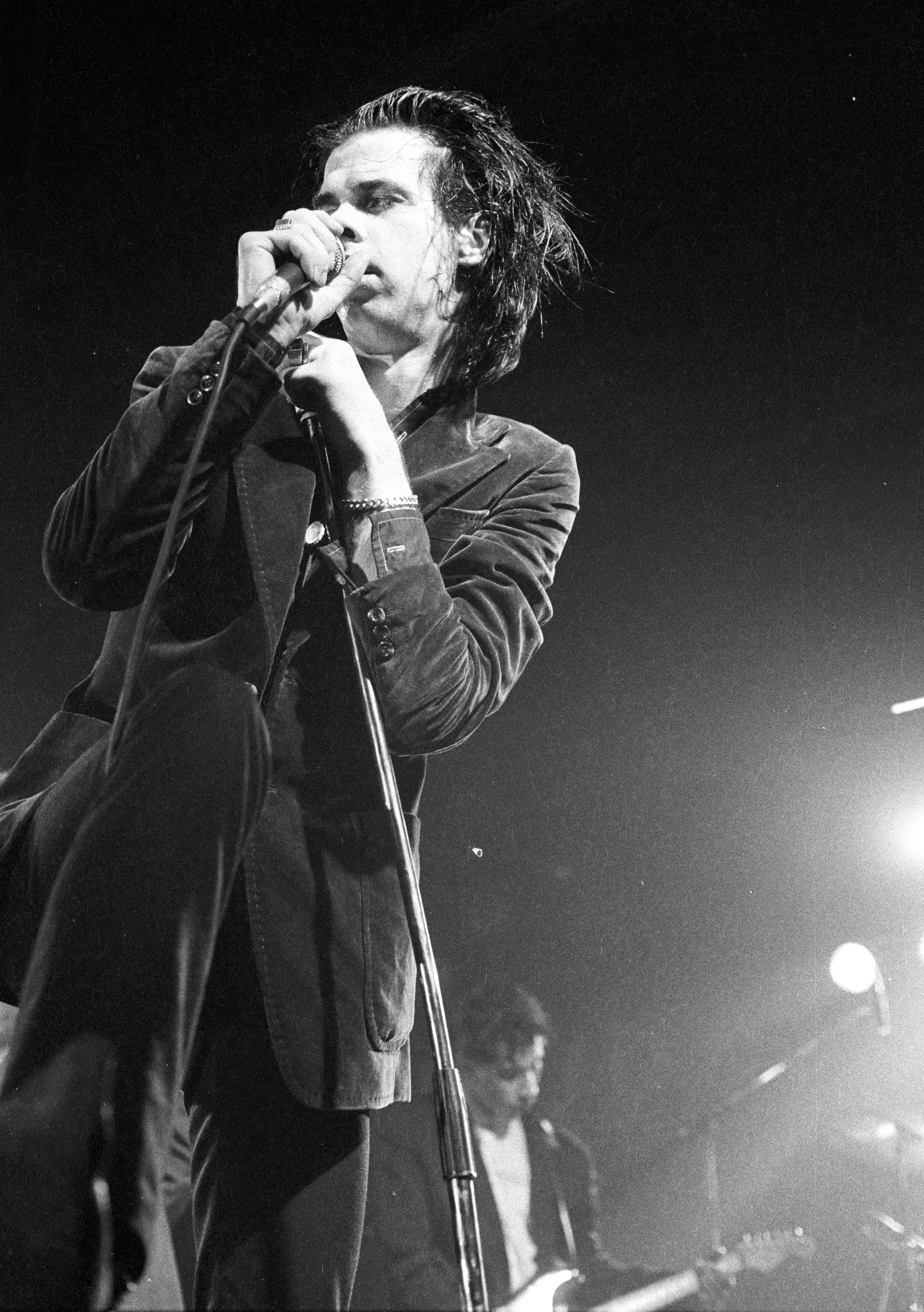 Futurama - Deinze - Belgium - 1986